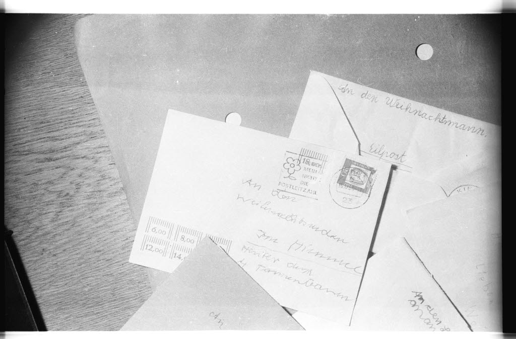 Briefe an den Weihnachtsmann in der Weihnachtspost im Postamt 1 am Stresemannplatz 1